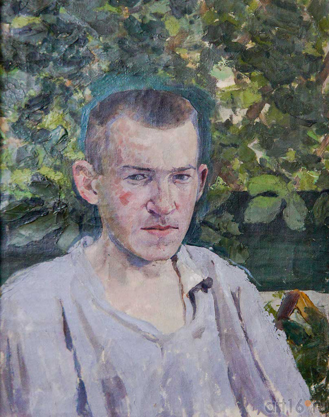 Self-portrait